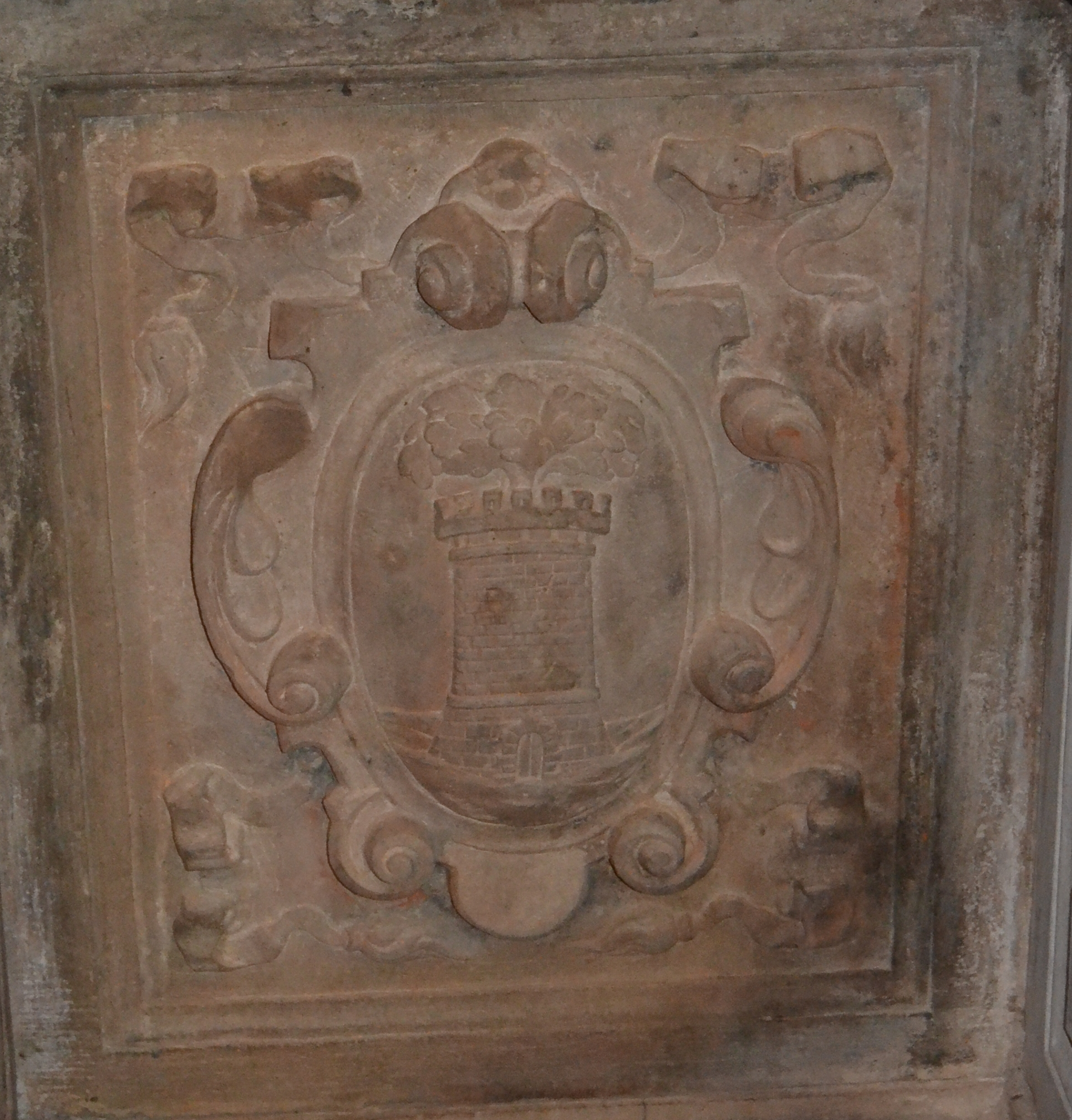 Escudo de Verdú en piedra del retablo de la Purísima de Santa María de Verdú.